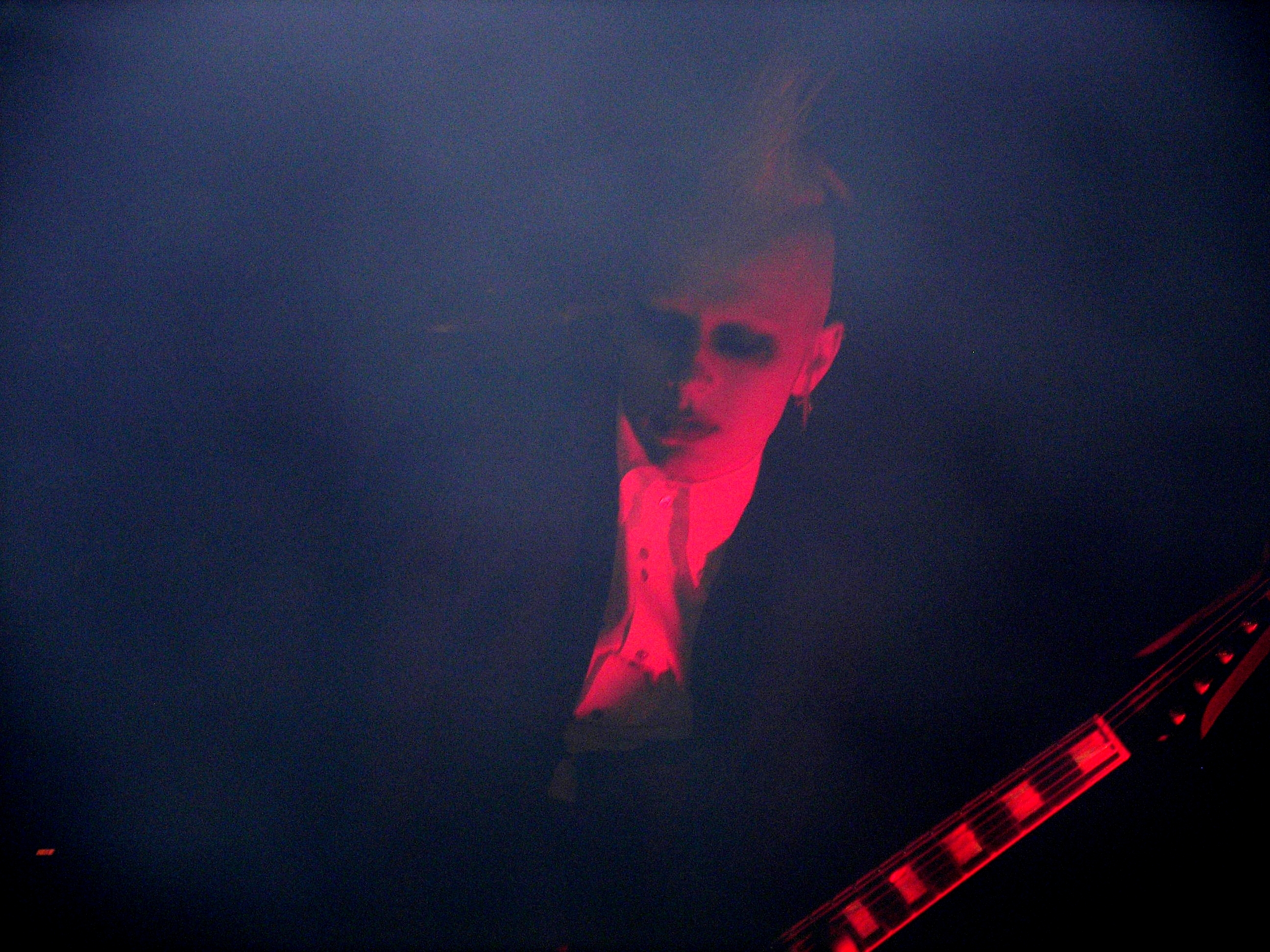 Tim Sköld live in Ljubljana